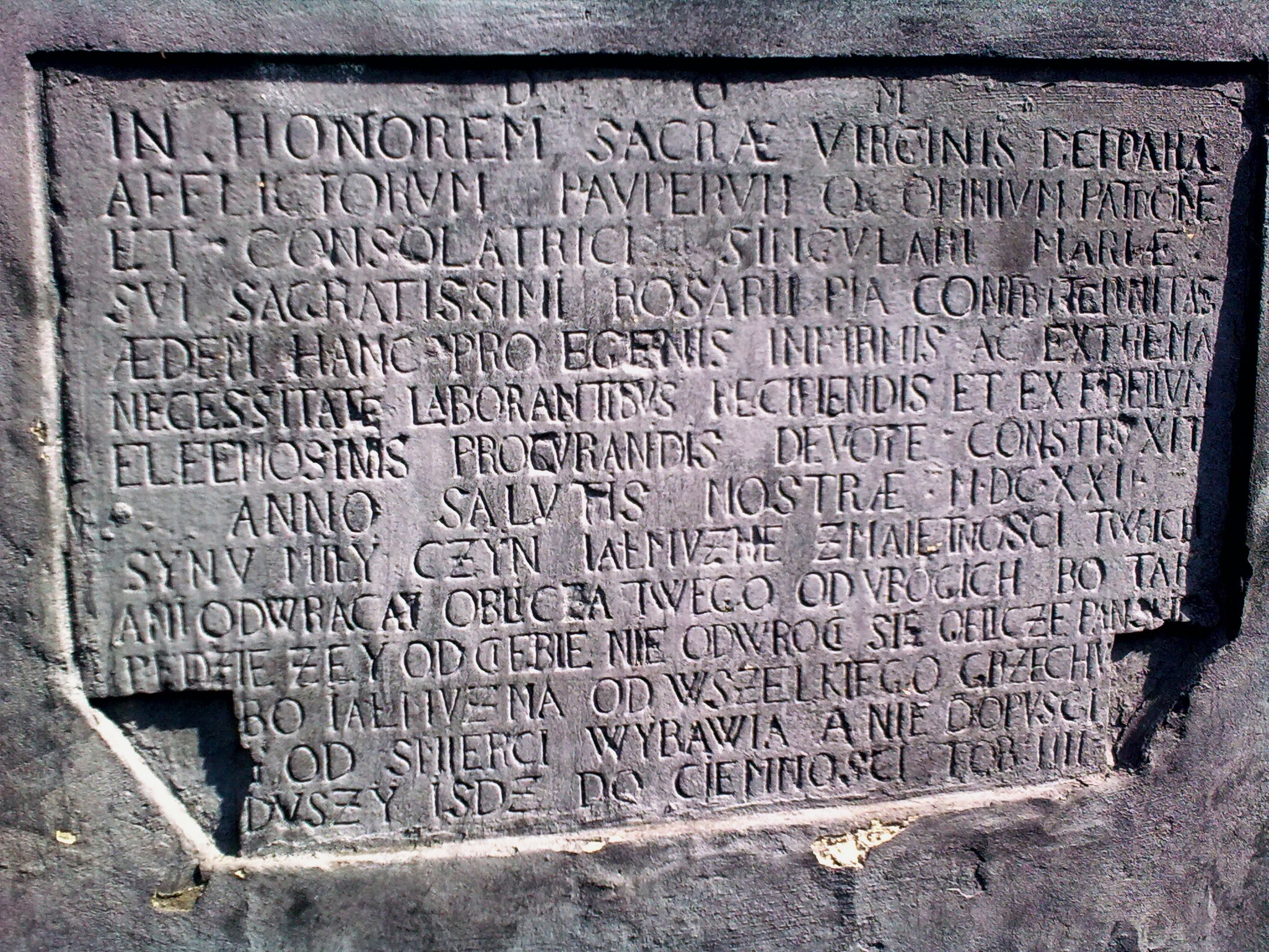 Płaskorzeźba w murze Szpitala Łazarza